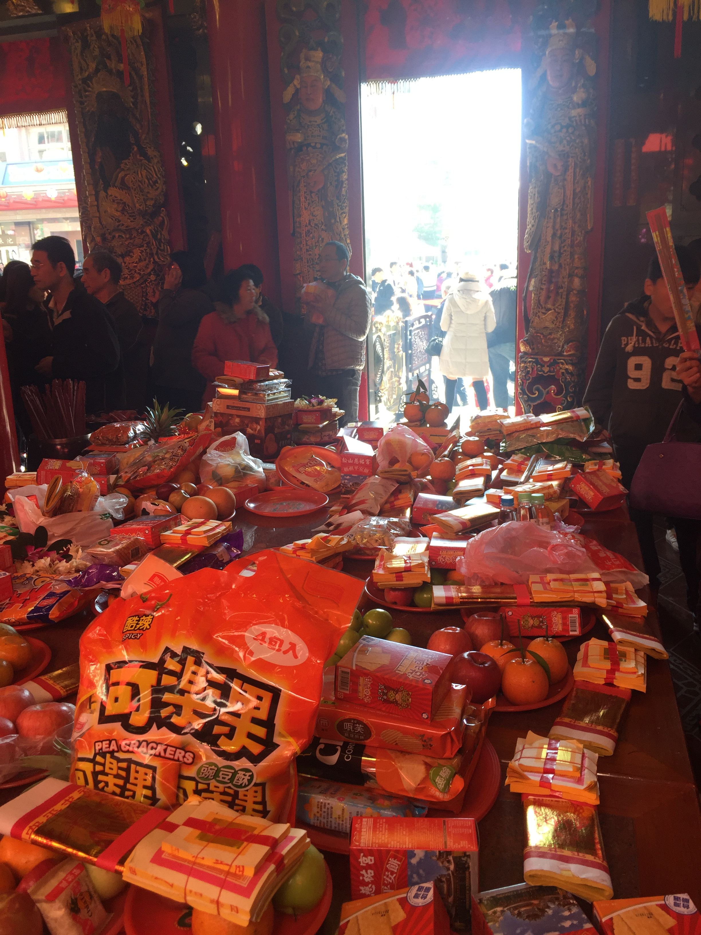 農曆大年初一上午，松山慈祐宮正殿供桌上的各色供品。左下角可見聯華食品可樂果豌豆酥酷辣口味4包入。